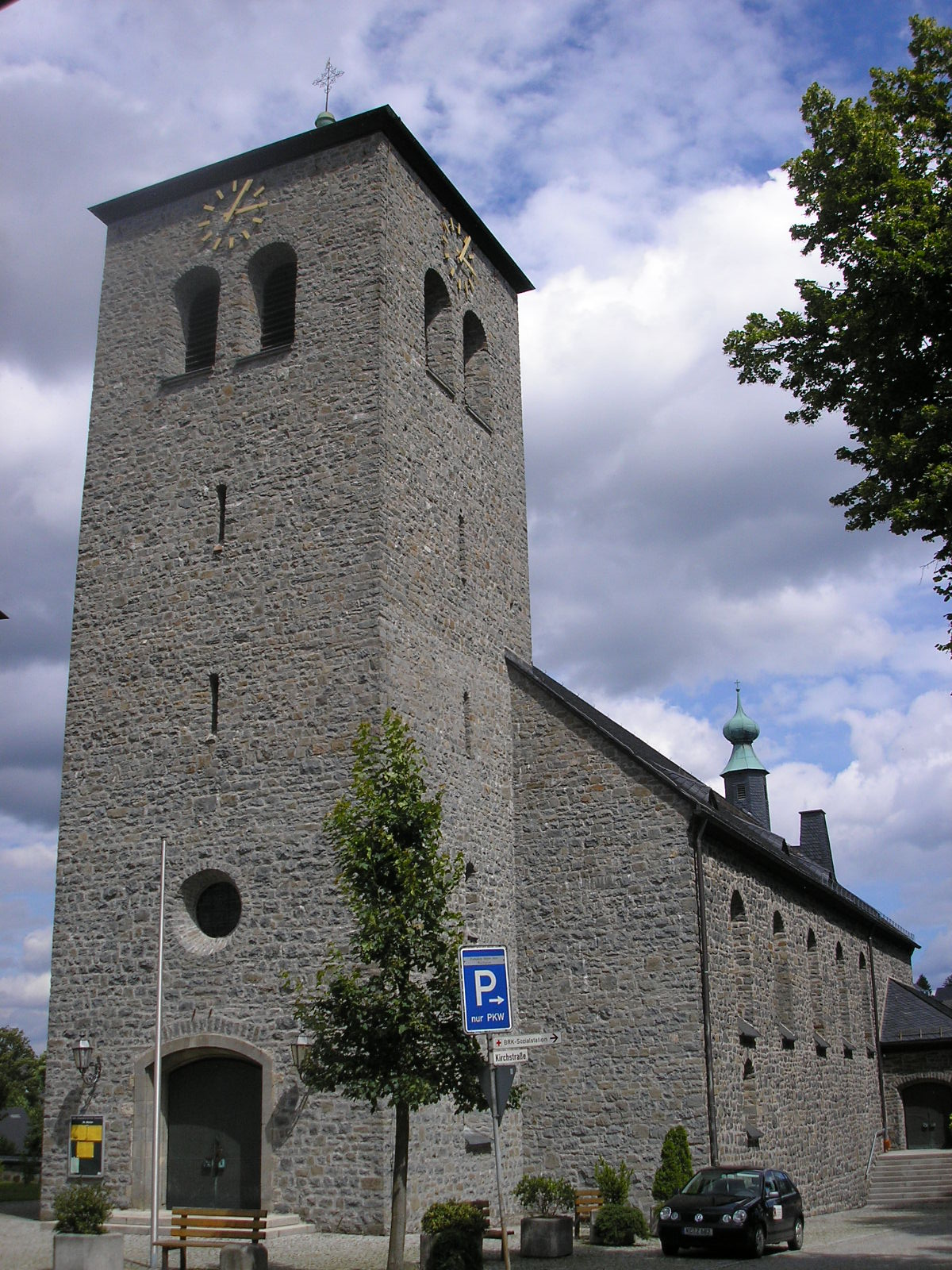 Die Kirche von Teuschnitz.